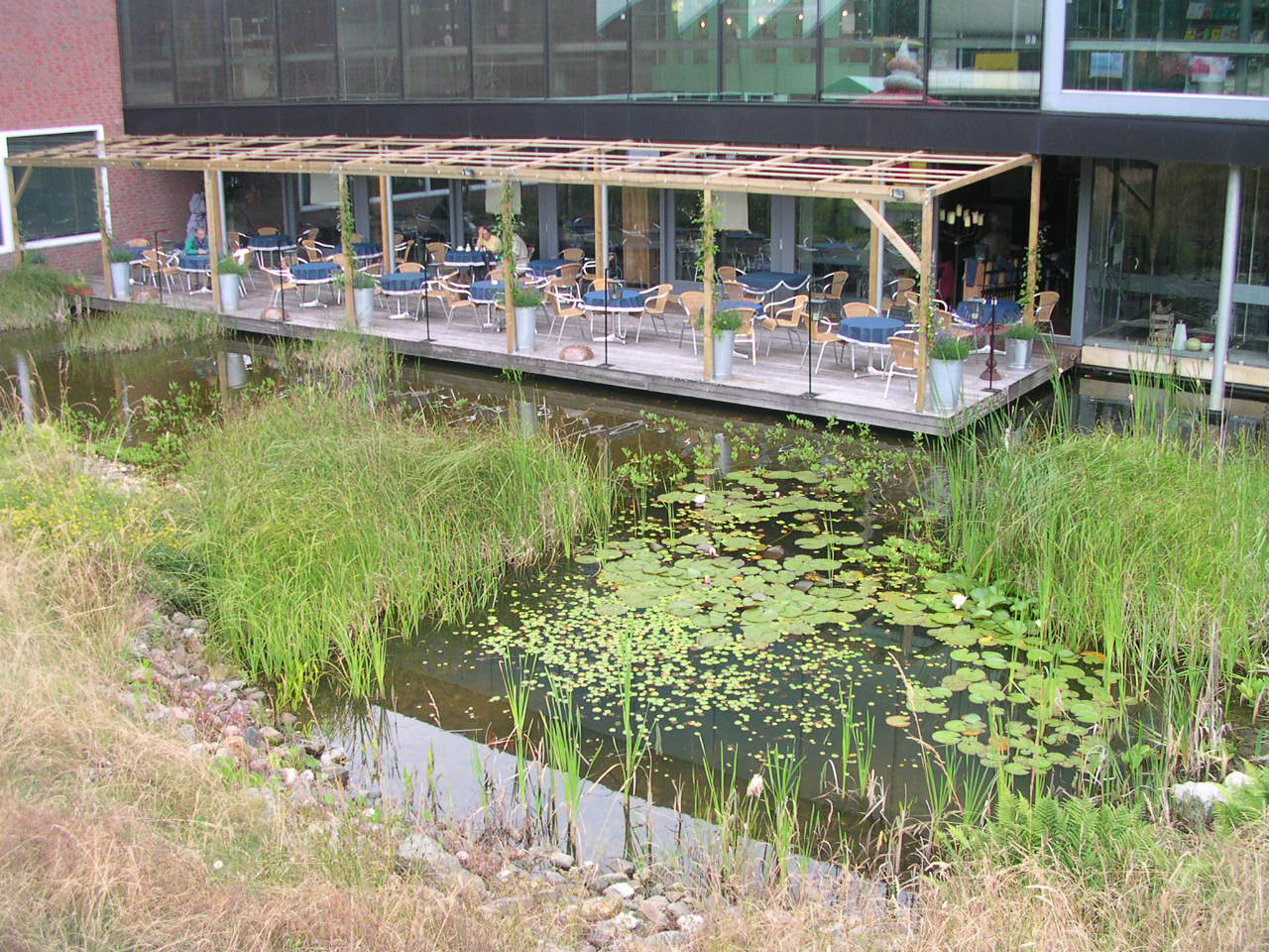 Teich am Industrion in Kerkrade